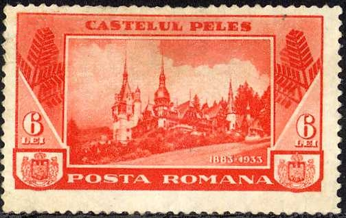 Castelul Peleş reprezentat pe o marcă poştală românească din 1933 cu ocazia aniversării semicentenarului construirii sale. 01